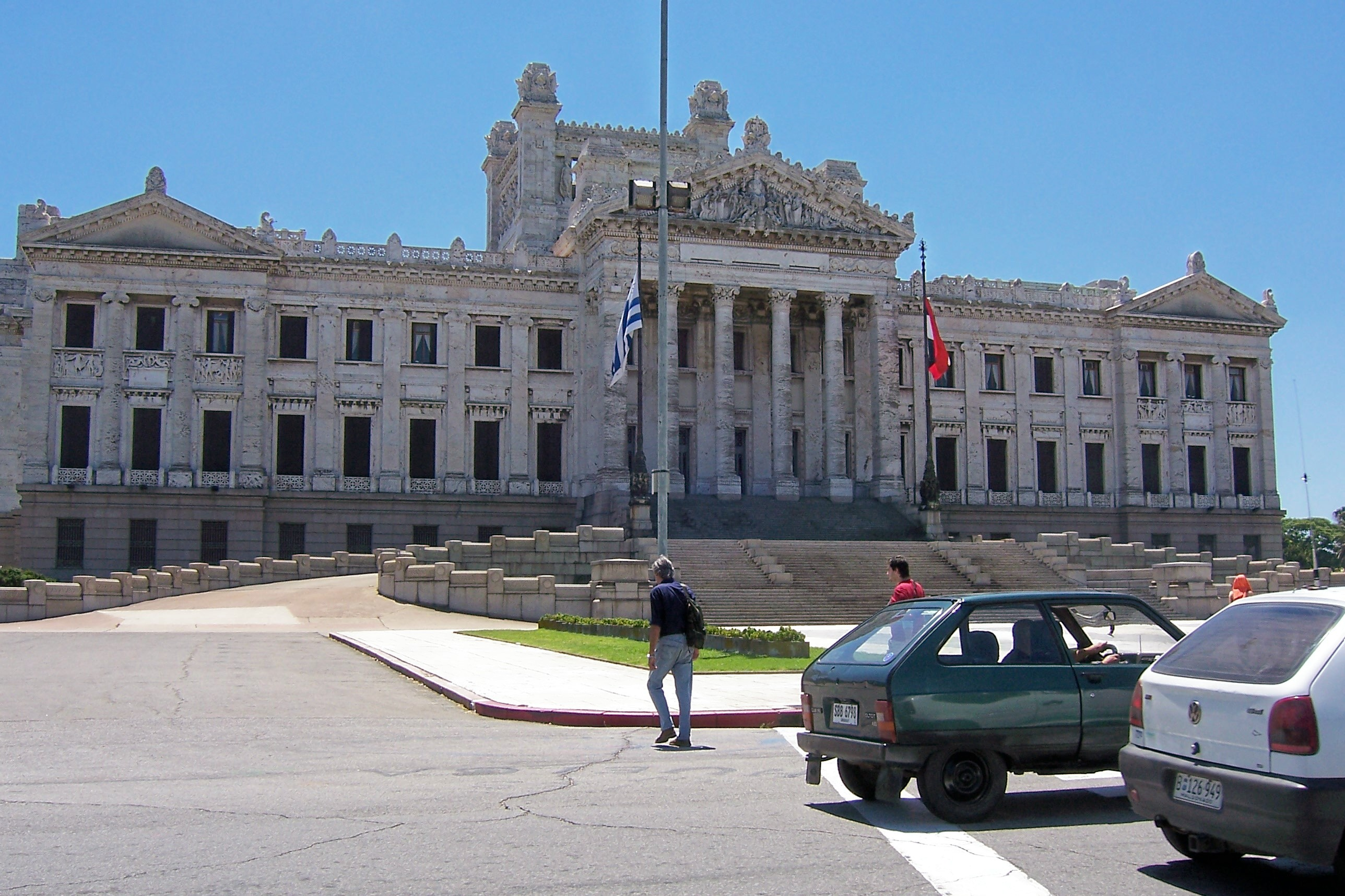 Vista de la fachada principal, Palacio Legislativo, Uruguay.